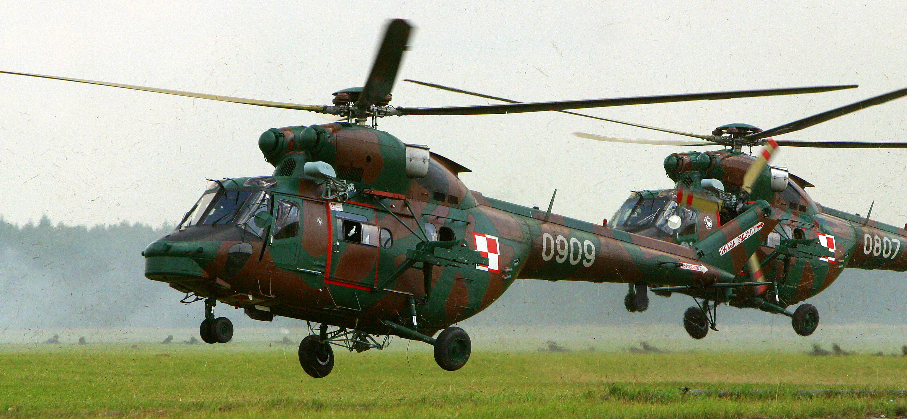 PZL W-3 Sokół